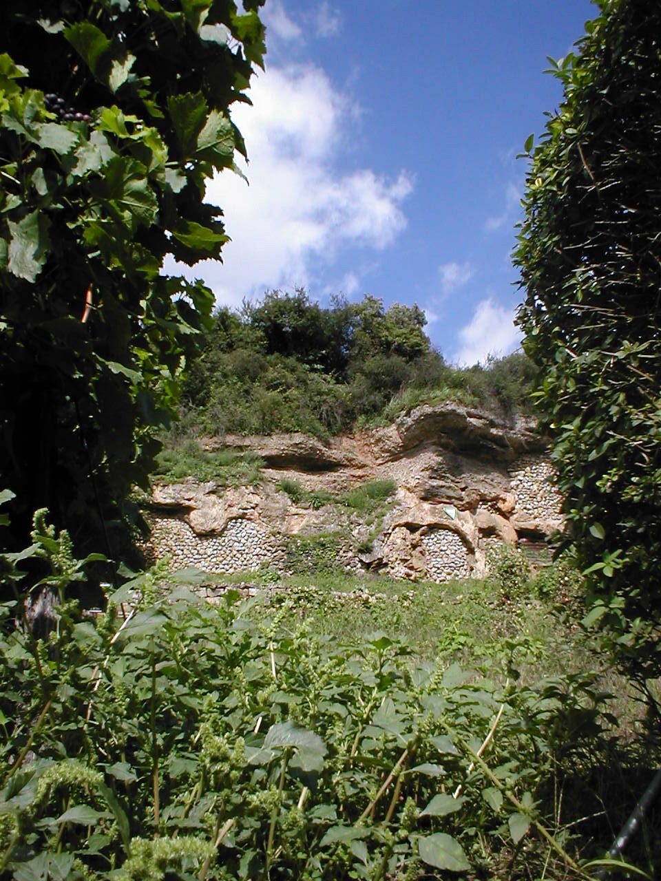 Felsengärten in Heilbronn-Klingenberg